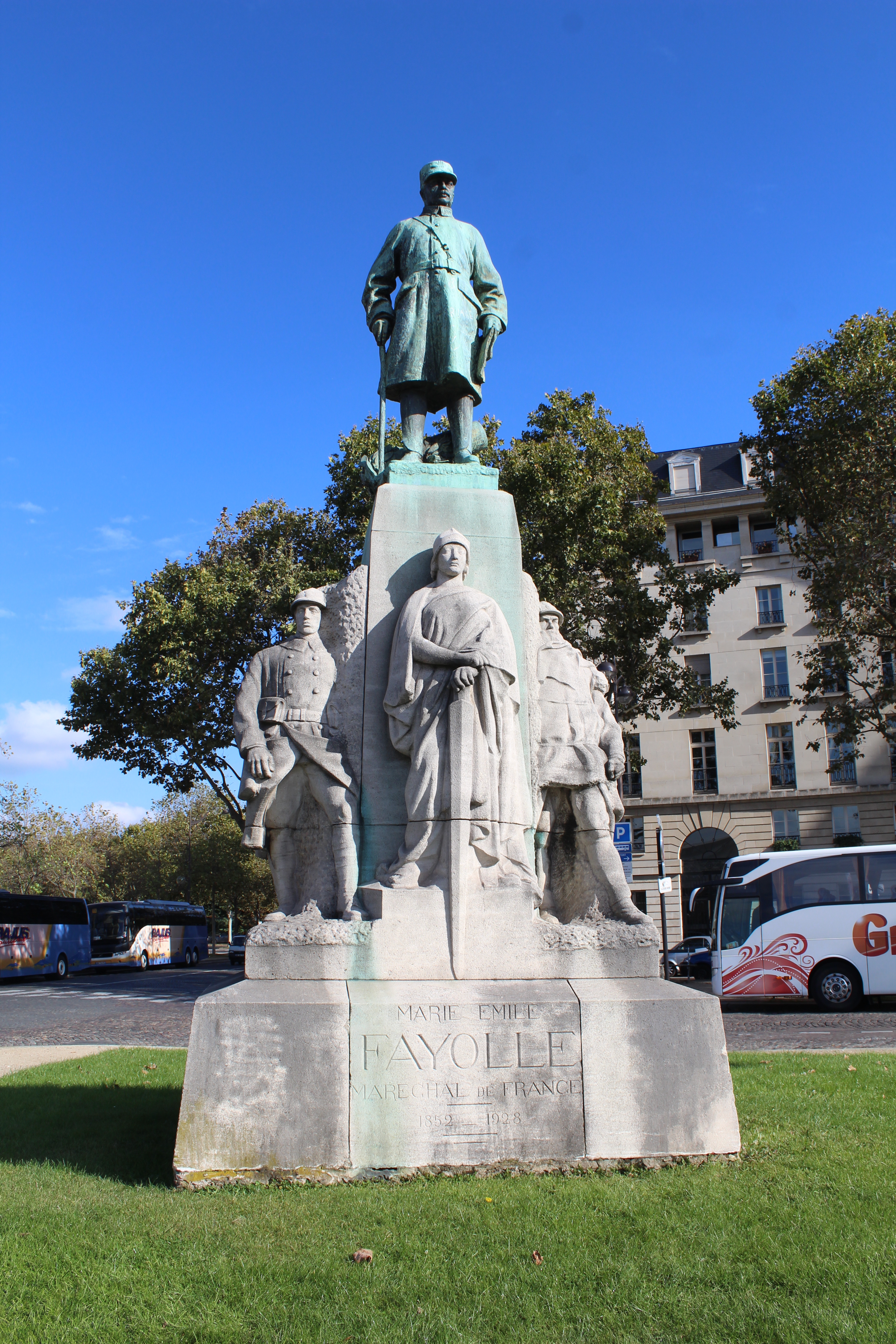 Statue du maréchal Fayolle sur la place Vauban à Paris.